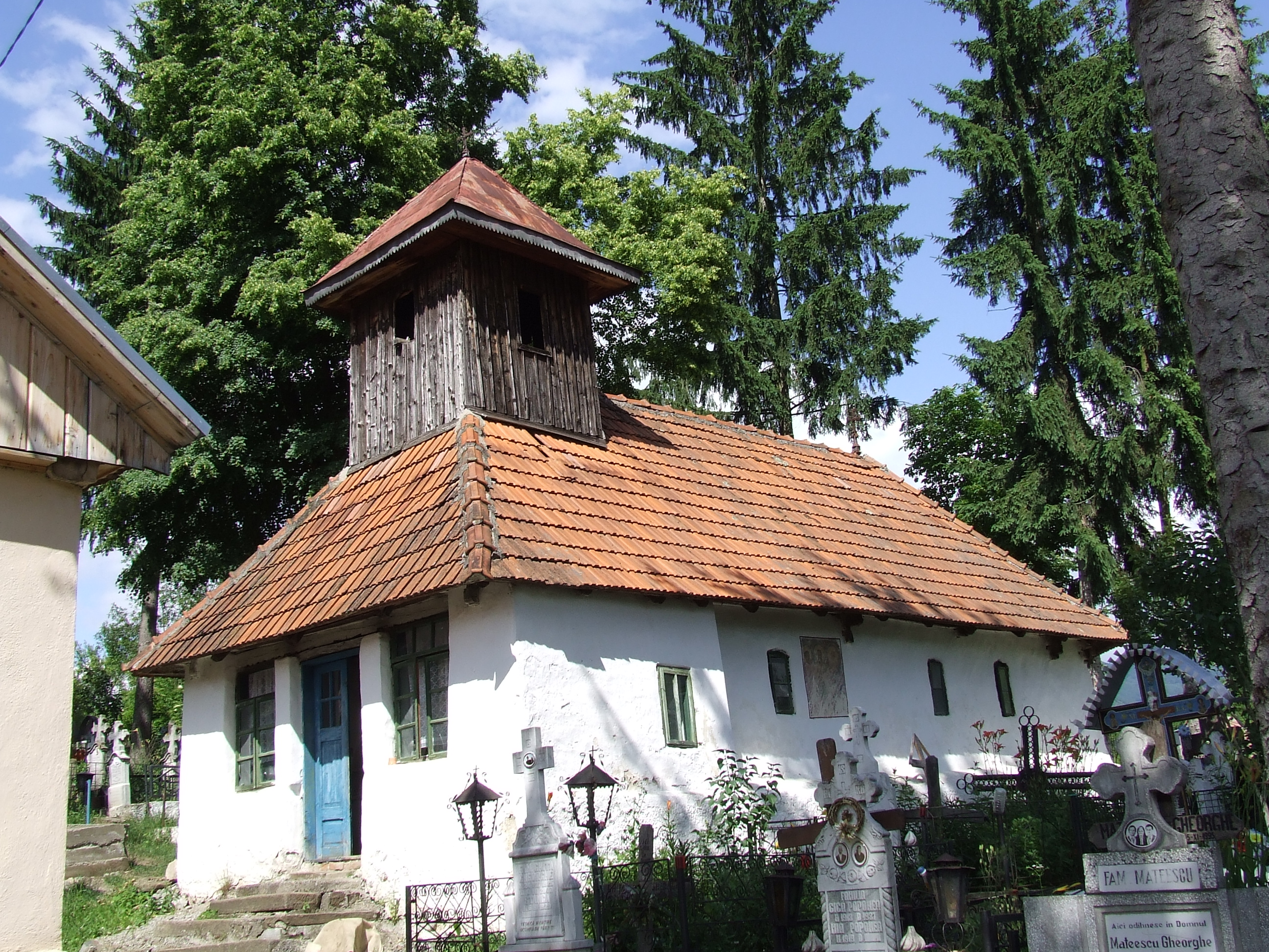 Biserica de lemn din Bratovești, județul Vâlcea.